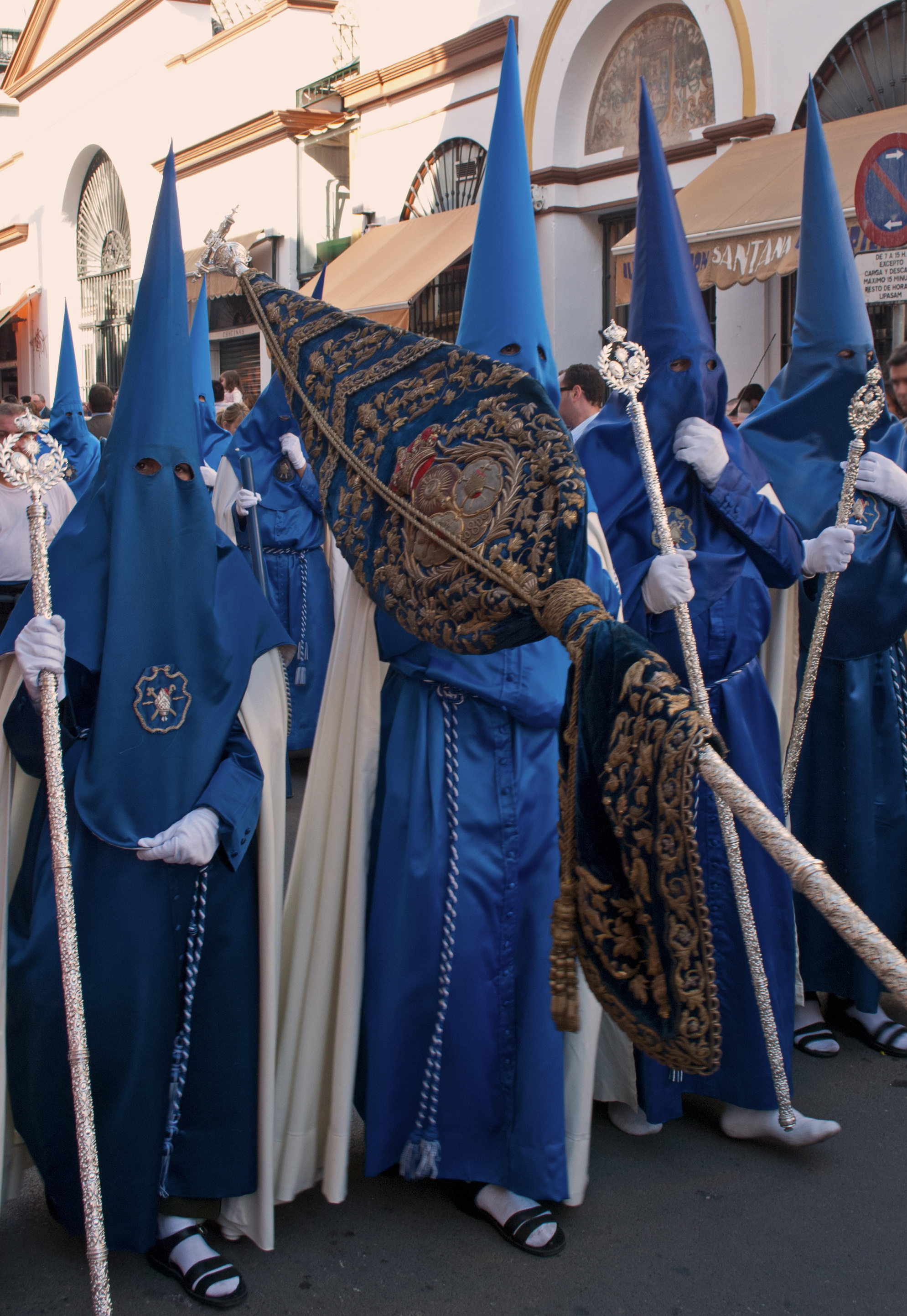 Nazarenos de la hermandad de la Hiniesta, transitando por la calle Feria. Semana Santa de Sevilla.